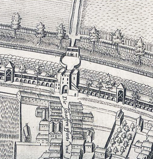 Ausschnitt des Mercator - Stadtplanes, Bereich Schafentor und Straße.Westliche Stadtmauer Köln